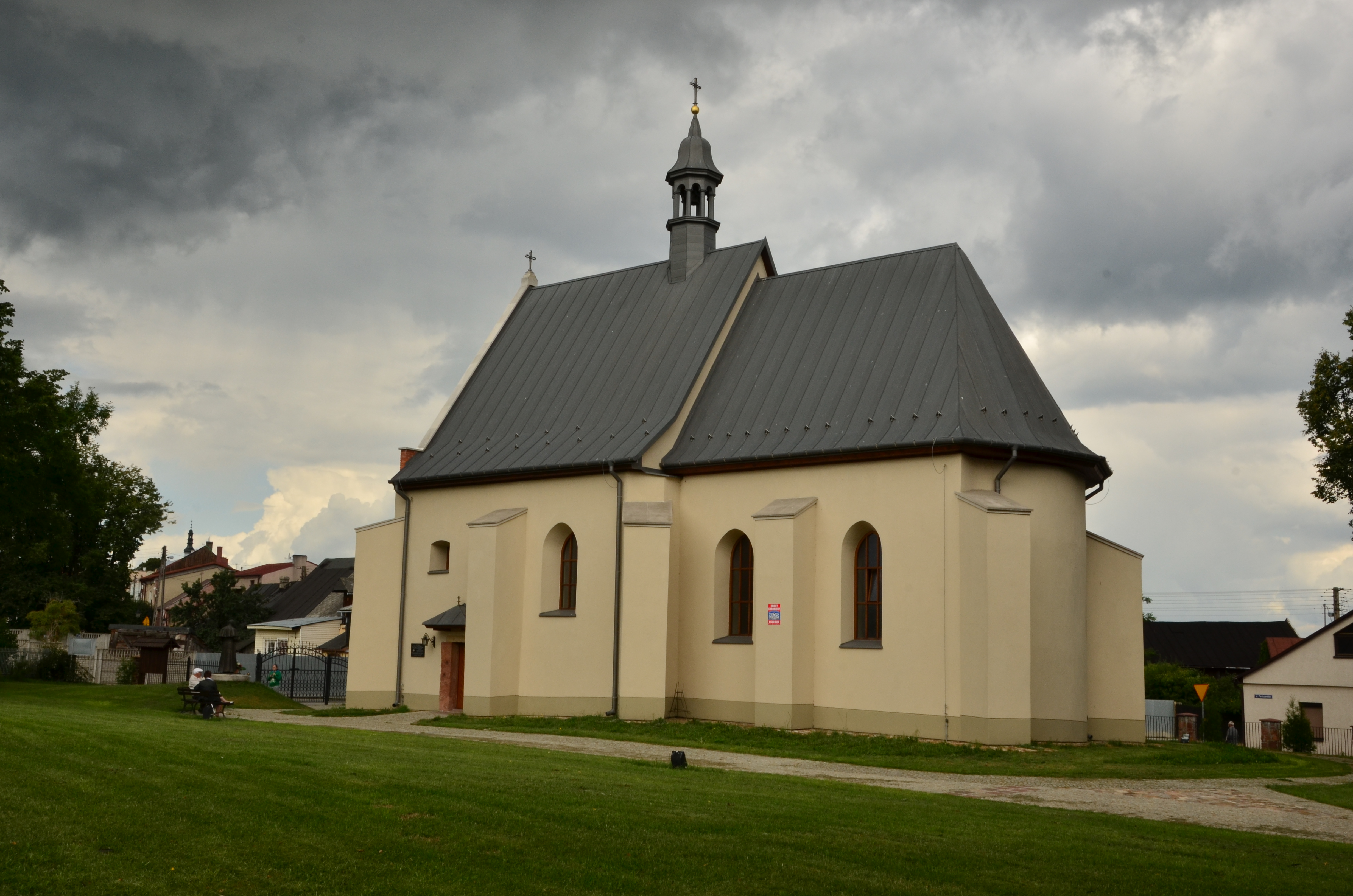 Bodzentyn, ruina , 1 poł. XVII w.(odbudowany w 1. dekadzie XXI w.)